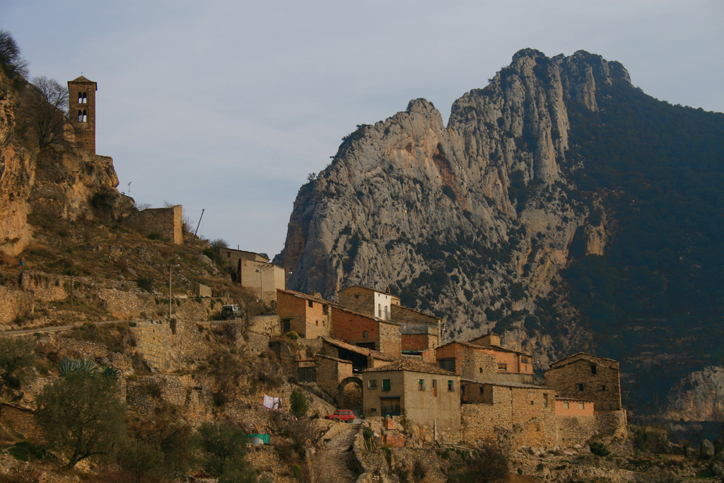 Vista panoràmica d'Abella de la Conca